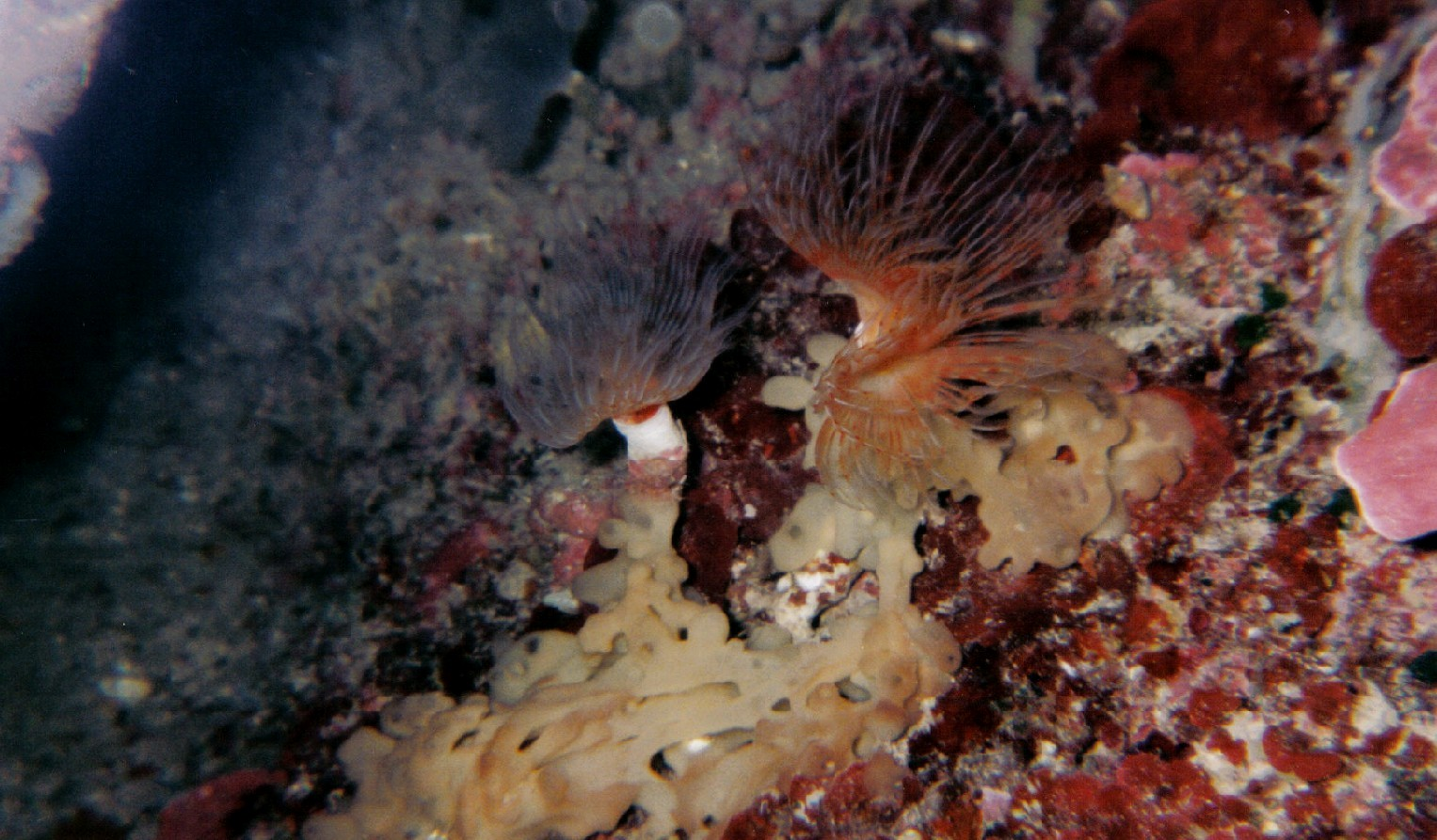 Protuala tubularia 1